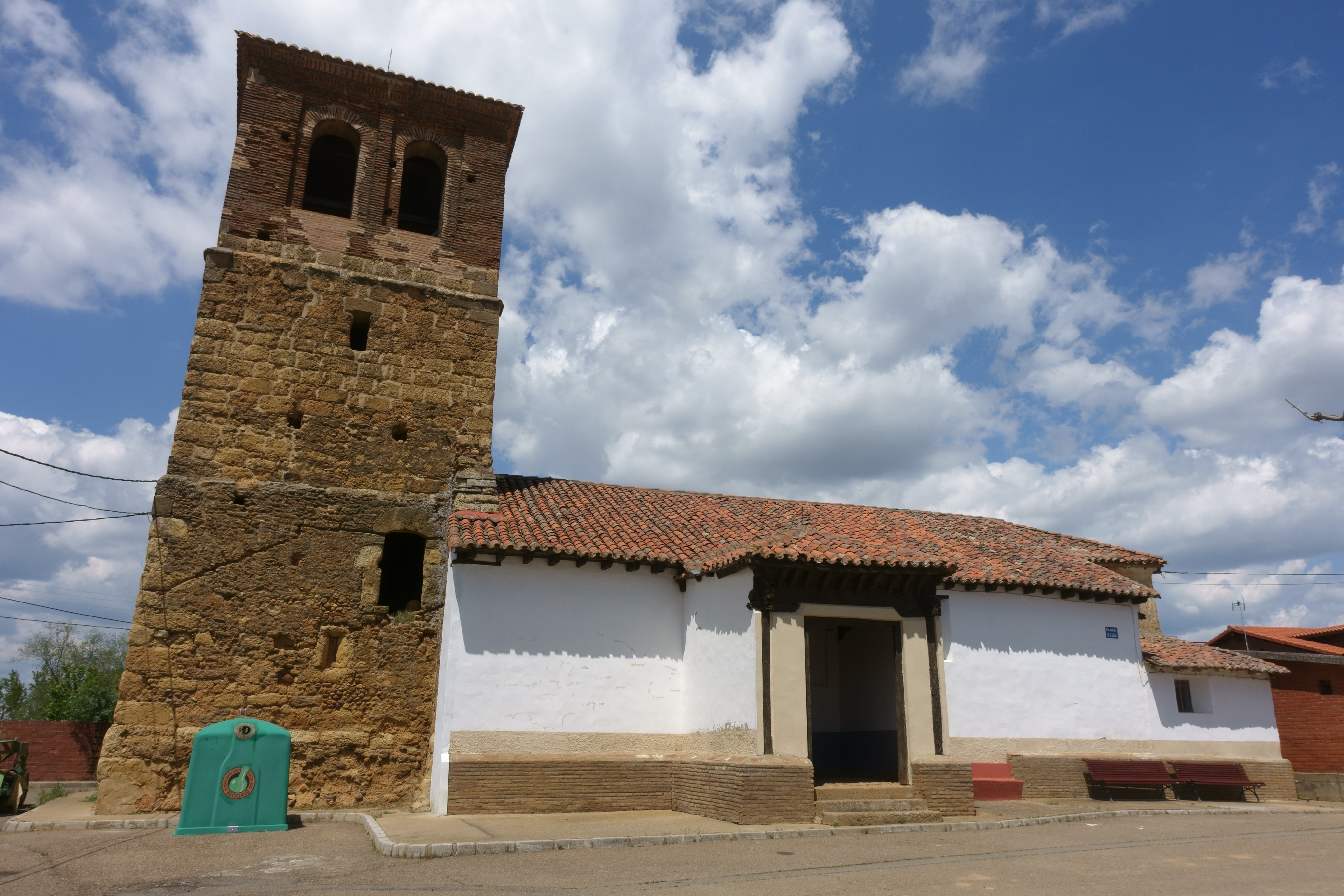 Iglesia de los santos Facundo y Primitivo, Villaselán (León, España).